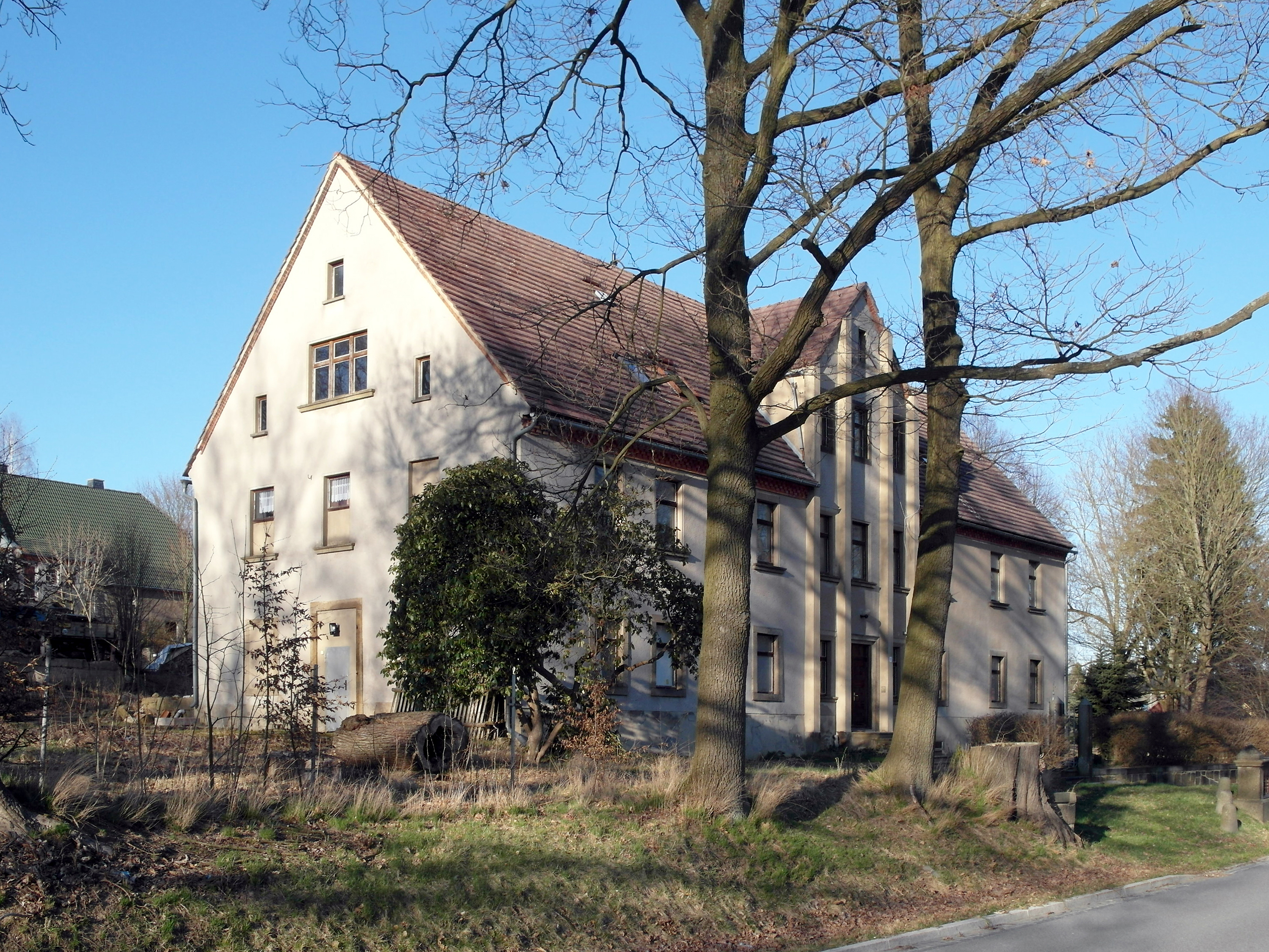 27.03.2017 02689 Taubenheim (Sohland Spree) Sohlander Straße 83A: Schloß NiederTaubenheim, 1890 für Marie von Nostitz und Jänckendorf erbaut. In der DDR als Wohnhaus genutzt. Sicht von Südwesten (Straßenseite). [SAM9083.JPG]20170327605DR.JPG(c)Blobelt